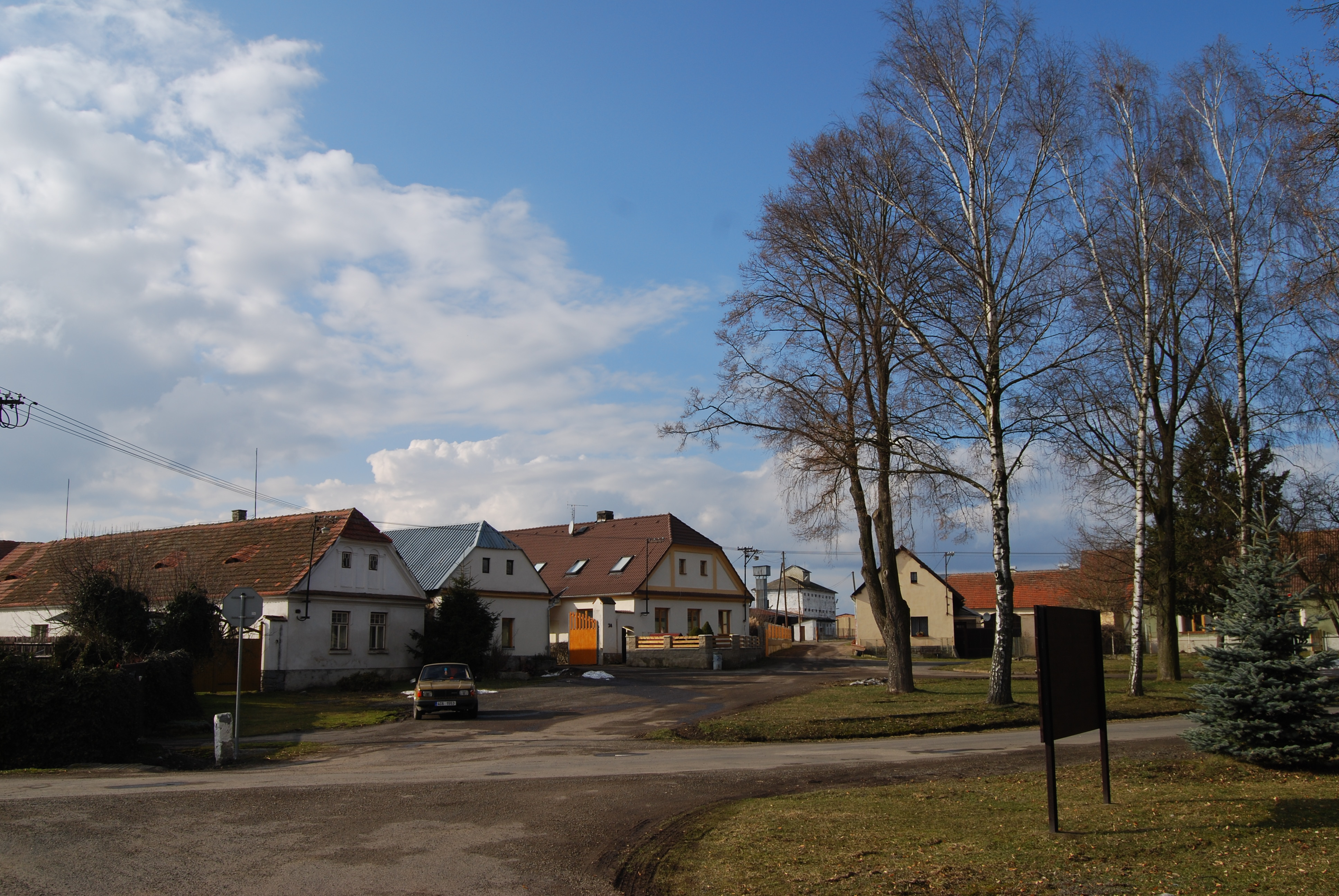 Pohled na domy v okolí návsi. Králova Lhota. Okres Písek. Česká republika. - Google Maps - Google Earth